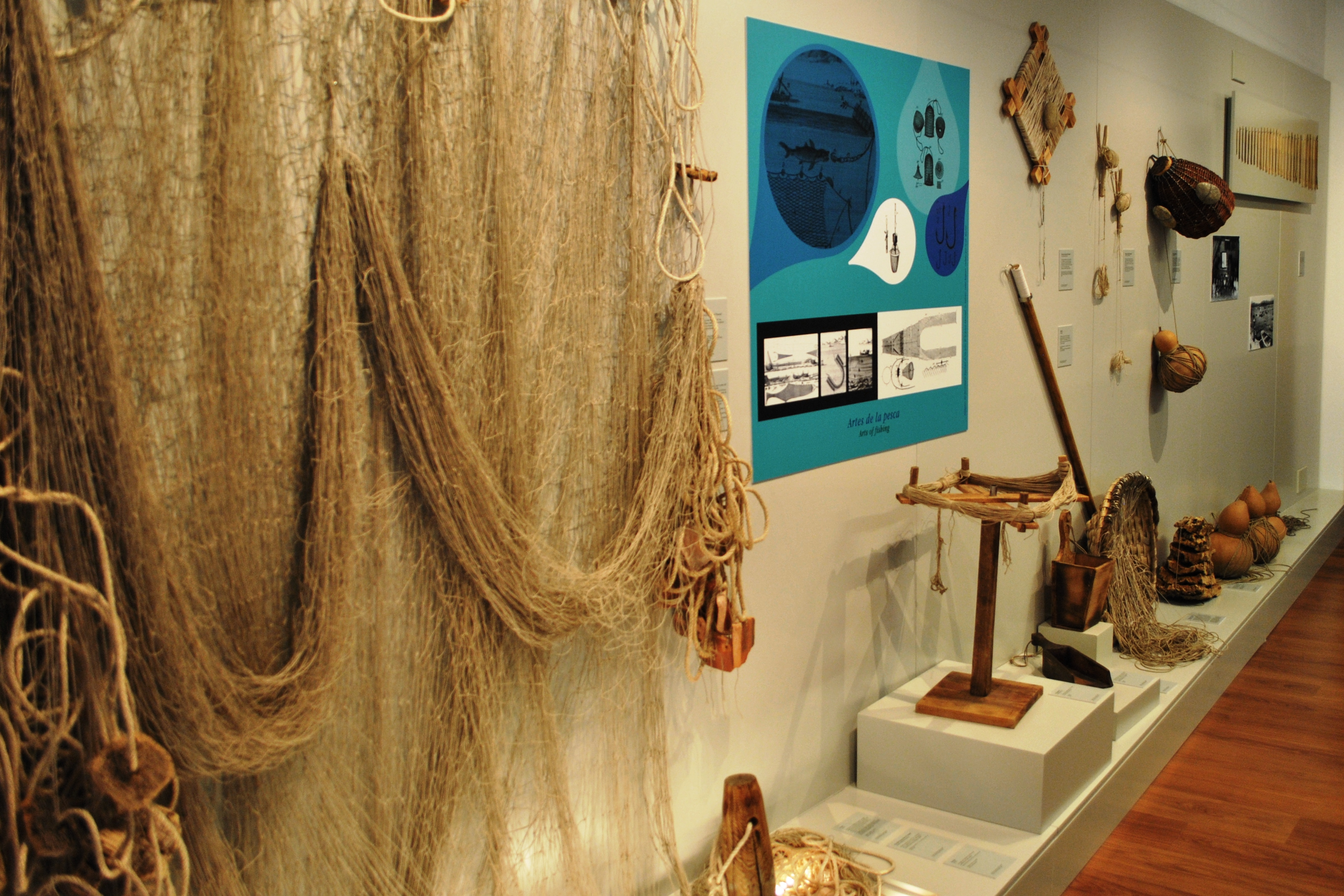 Véxase o título e as categorías